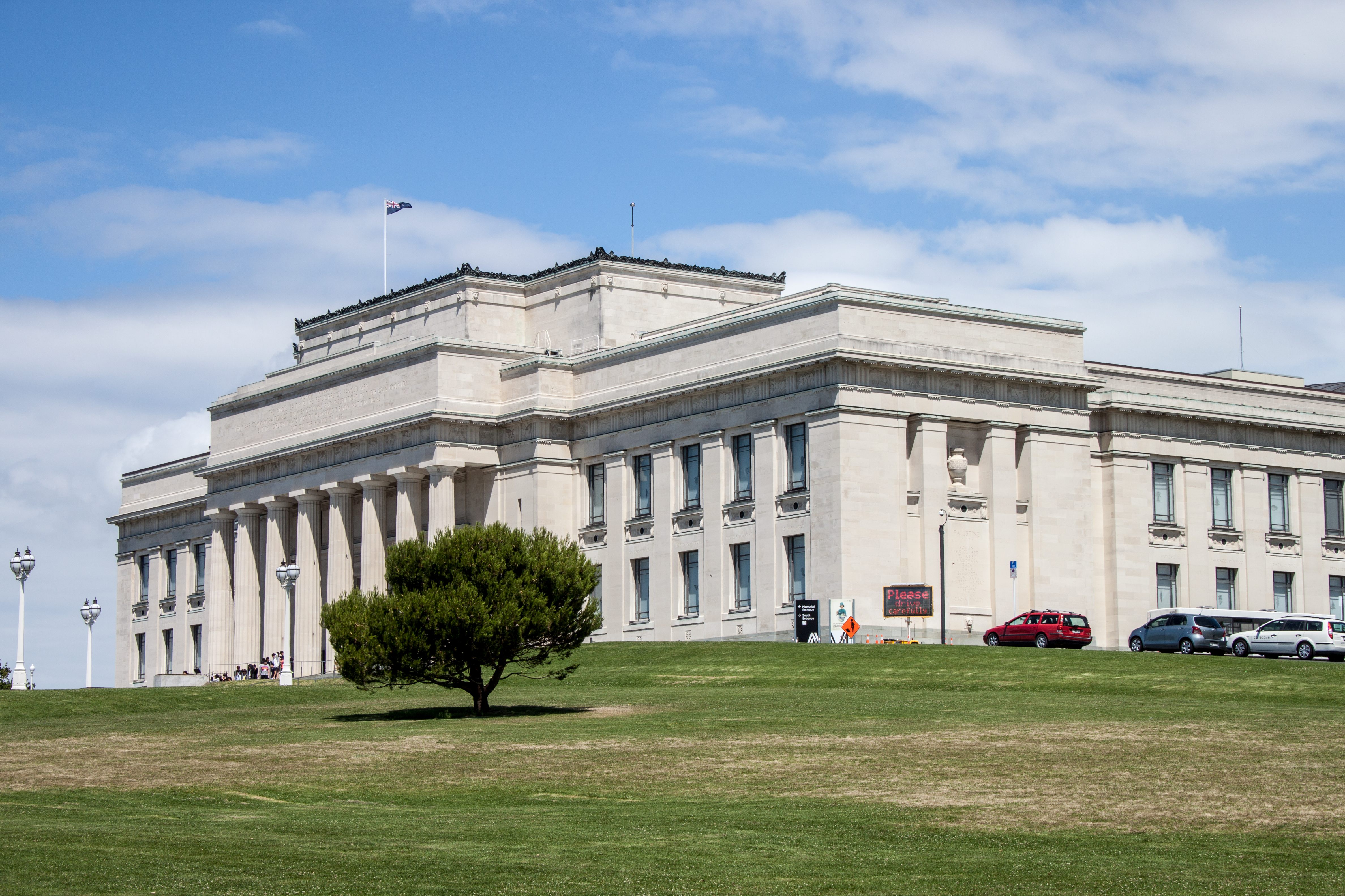 Auckland War Memorial Museum, exteriorlabel QS:Len,"Auckland War Memorial Museum, exterior" label QS:Lhu,"A múzeum külső képe"